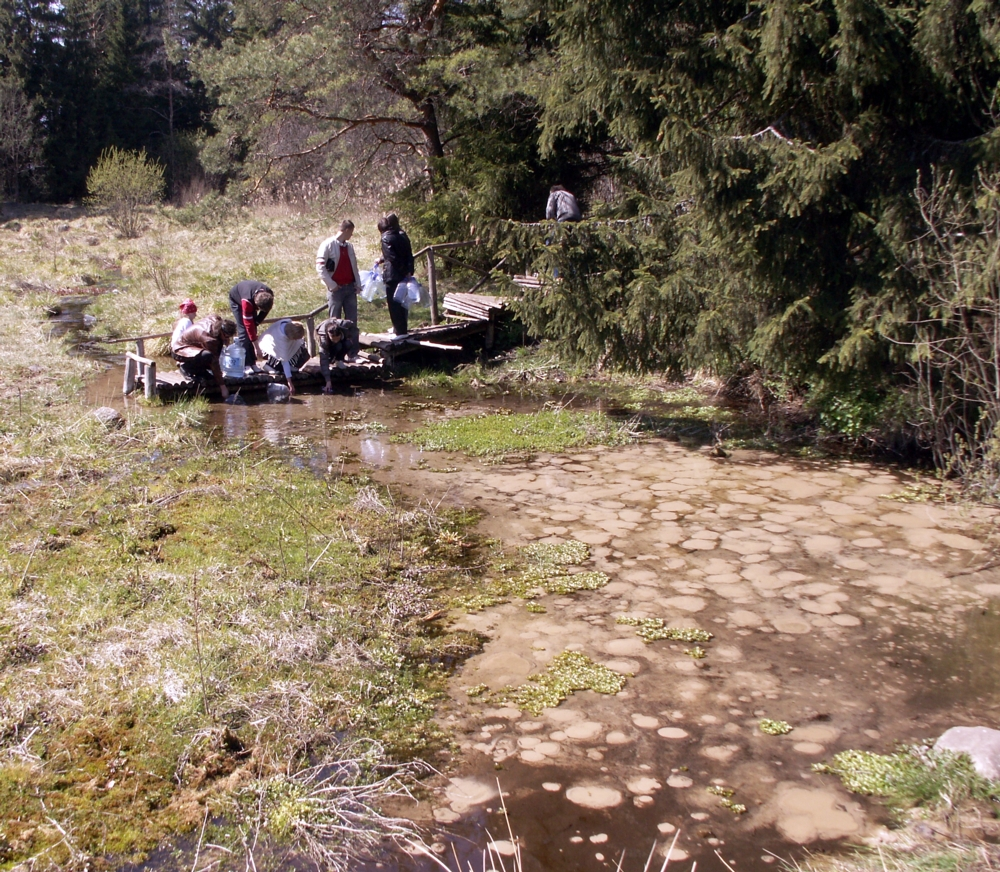 Svilės šaltiniai, Kurtuvėnų regioninis parkas